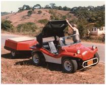 Reno – um projeto nacional